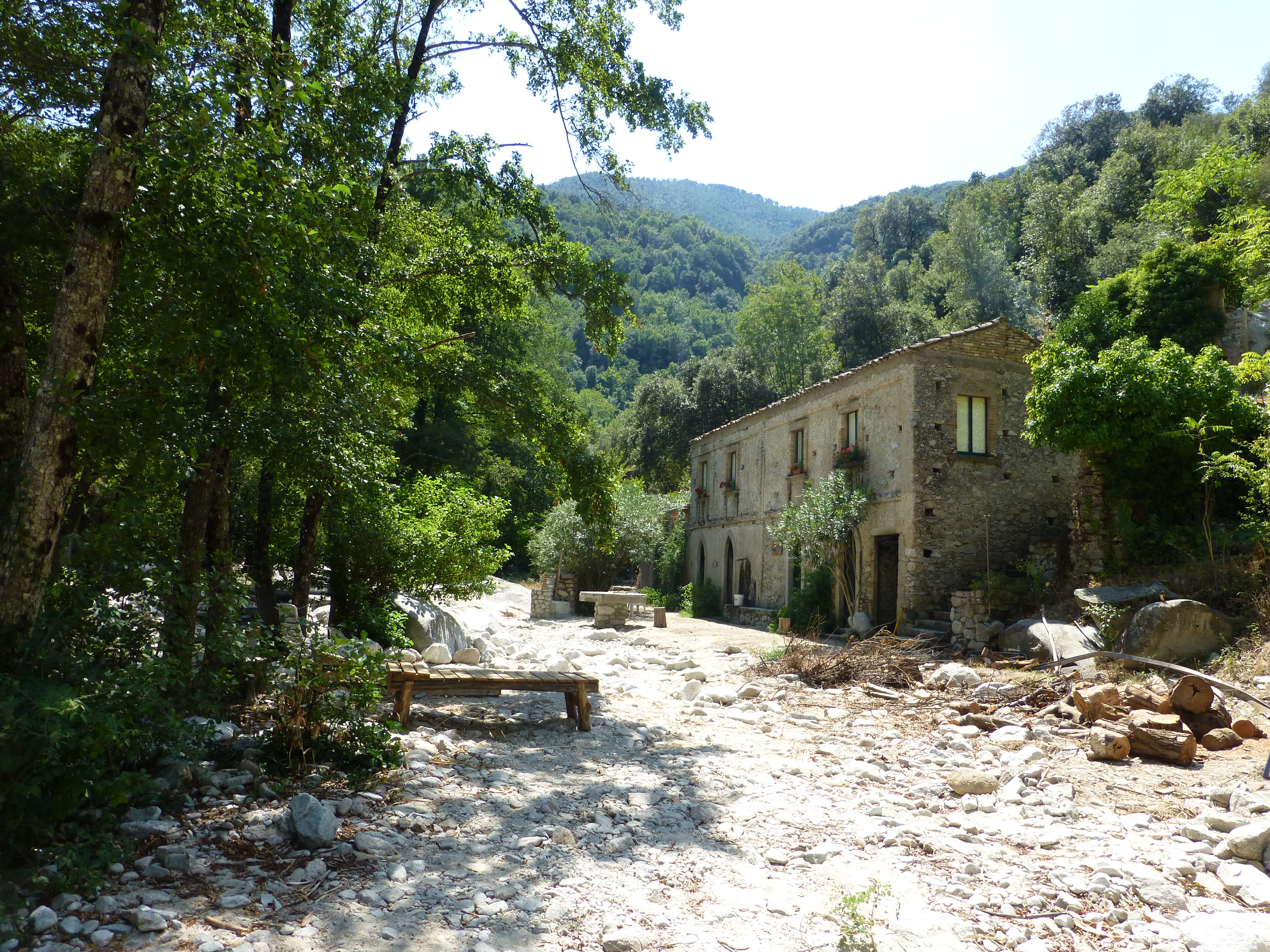 Bagni di Guida Bivongi (RC - Italy)